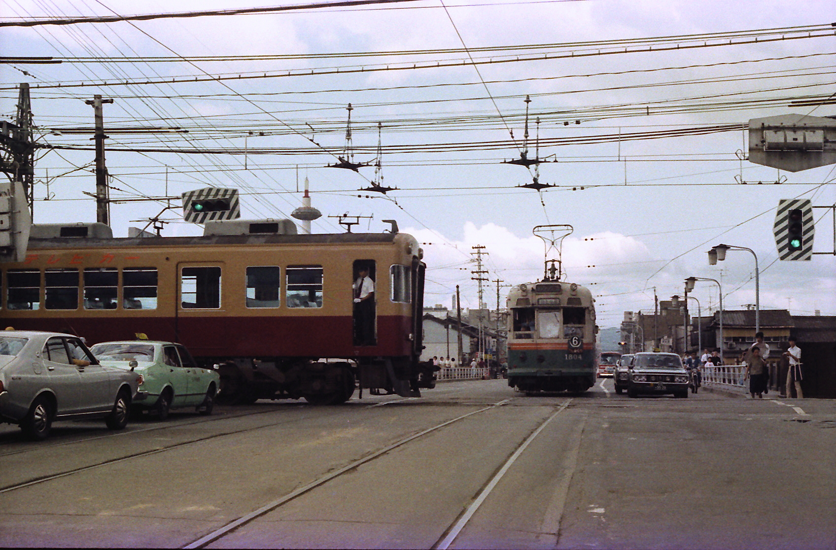 七条通り 京阪本線（七条駅）との平面交差 京都市東山区